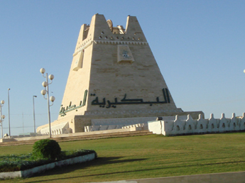 إحدى دوارات مدينة البكيرية